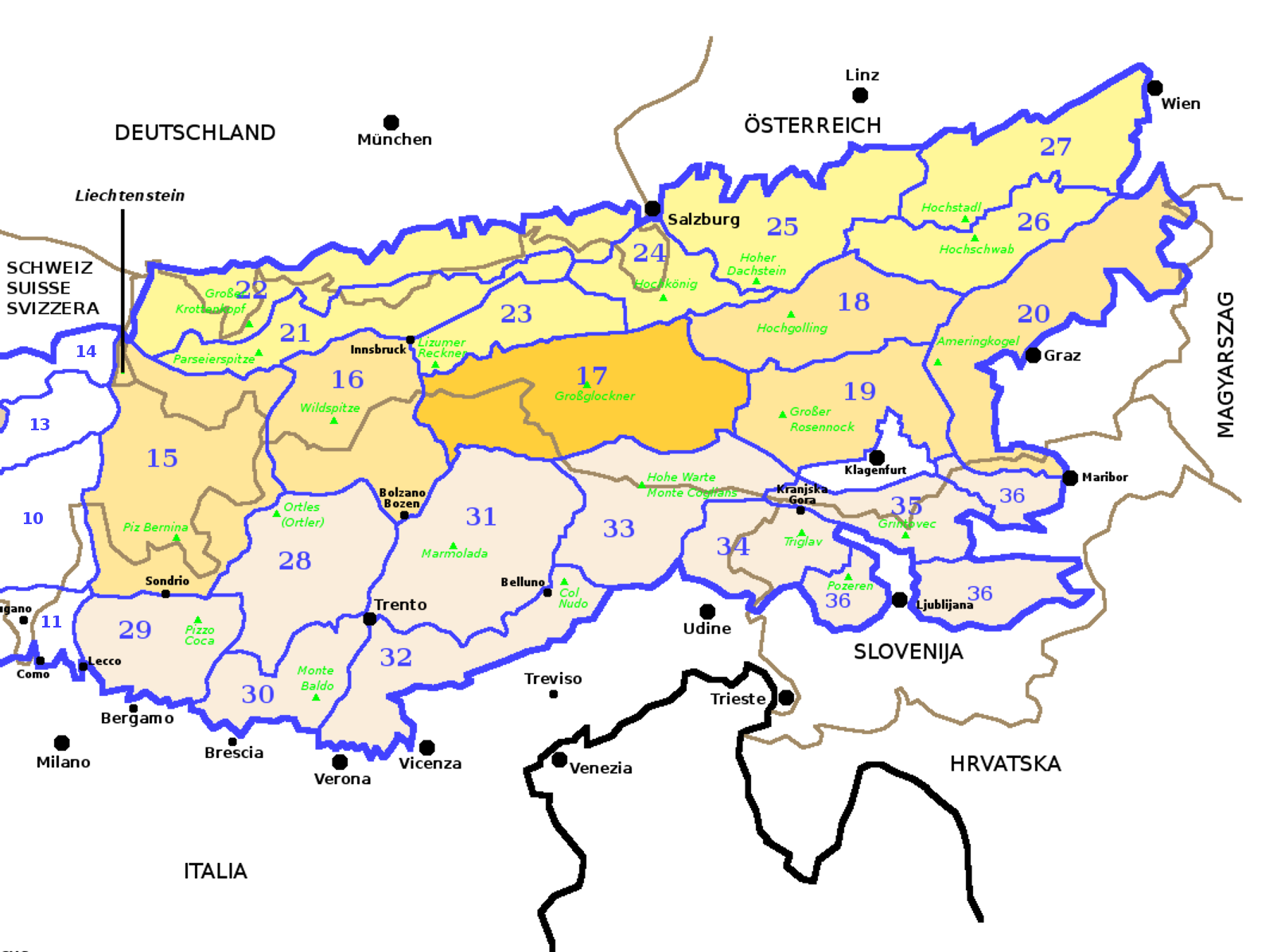 Alpi Orientali secondo la SOIUSA con evidenziate le Alpi dei Tauri occidentali